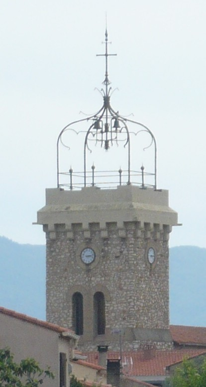 Clocher de l'église Saint-Pierre à Théza